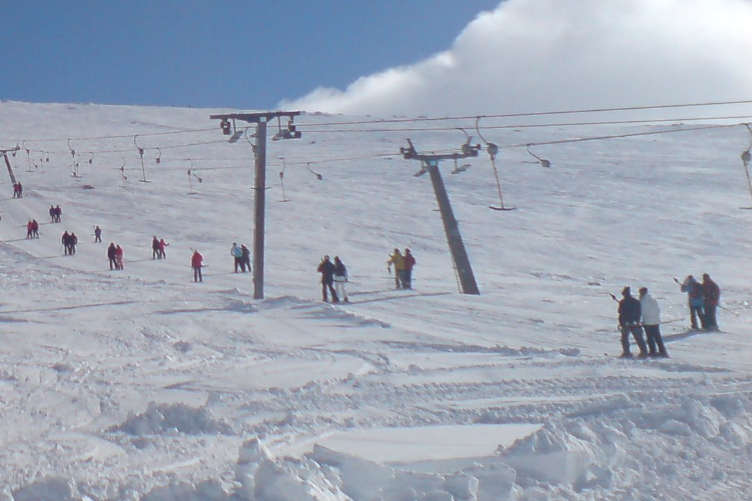 T-bar lift